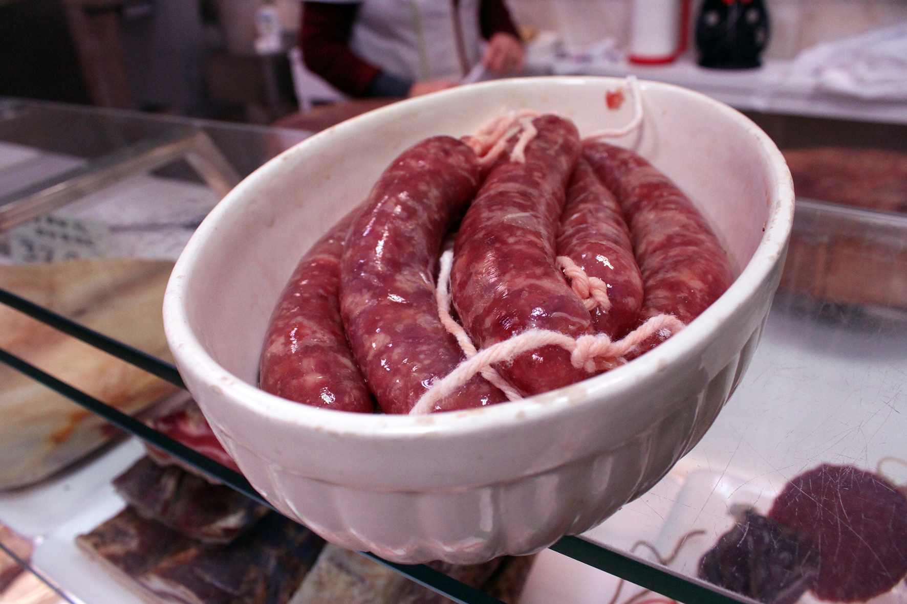 Botifarra dolça, foto de la Piràmide d'aliments de l'Empordà